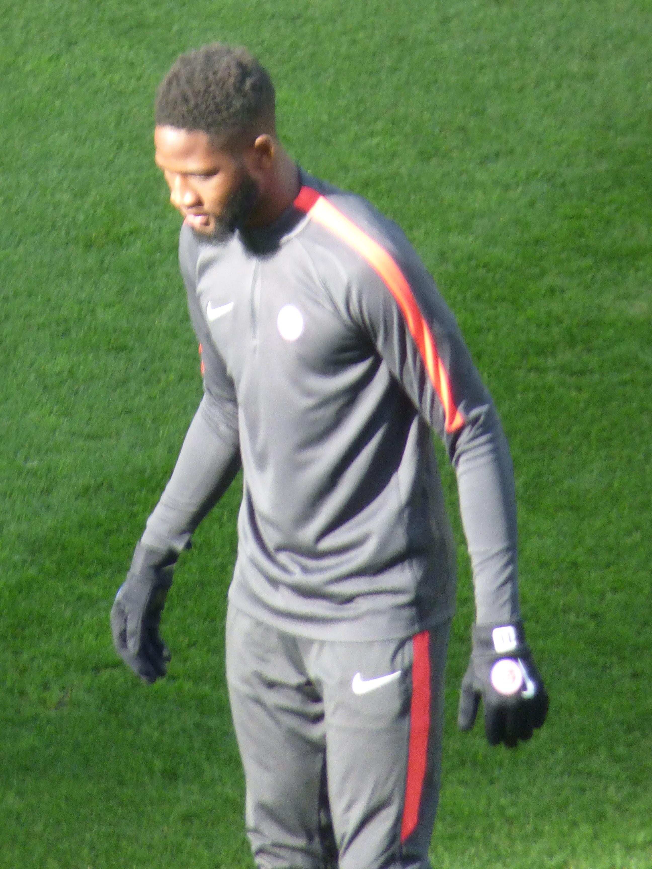 Abdoulaye Sissako avant le match RC Lens / LB Châteauroux, le 3 novembre 2018, comportant pour la treizième journée du championnat de France de football de Ligue 2, au Stade Bollaert-Delelis.